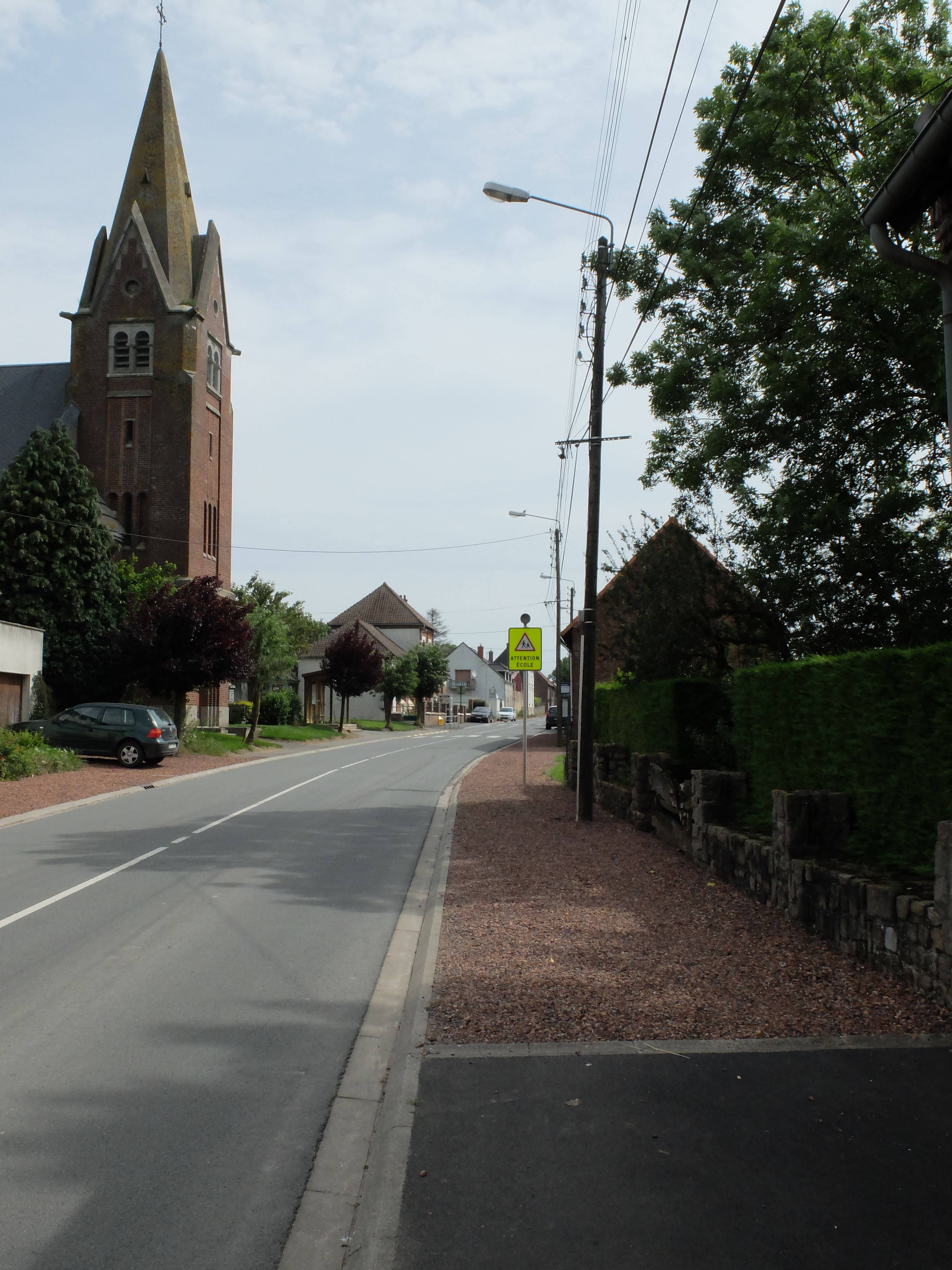 Vue de la rue principale de Saint-Martin-sur-Cojeul.